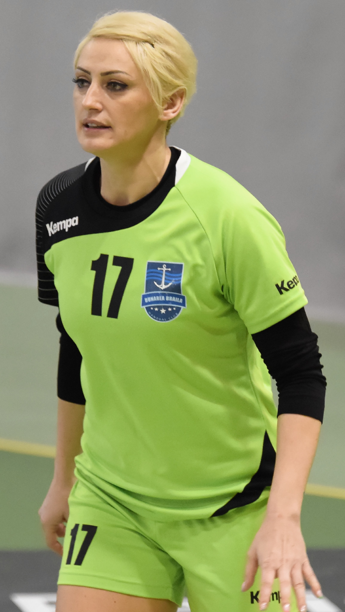 Rencontre de la coupe EHF: Issy Paris Hand / H.C. Dunarea Braila. A Meudon la forêt, le 14 février 2015.